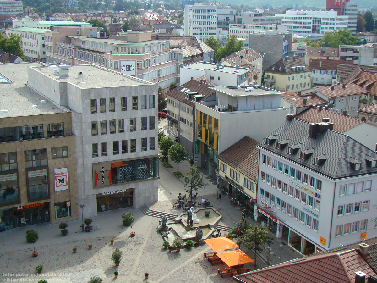 Kiliansplatz in Heilbronn mit Neuem Stadtbrunnen